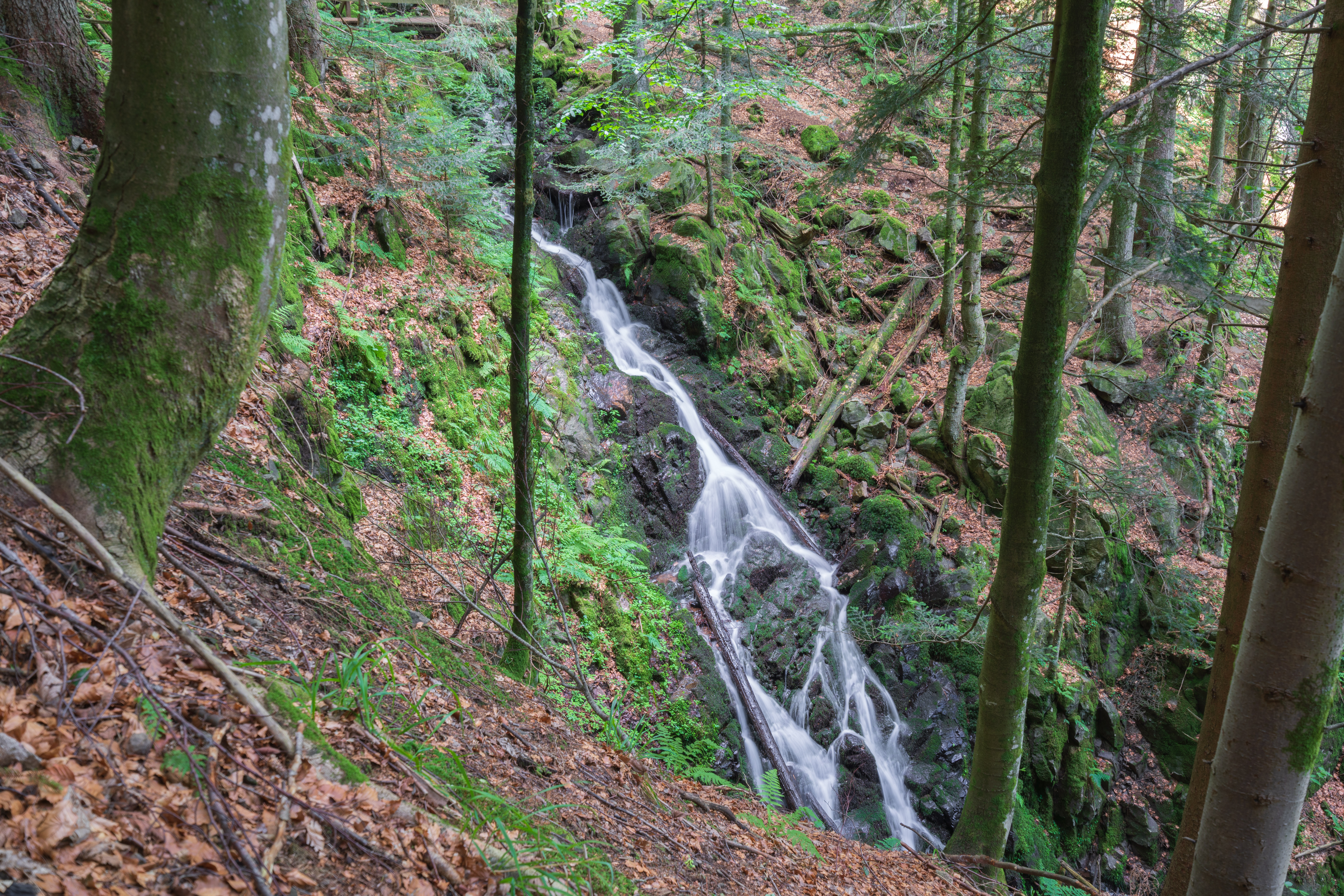 großer Hirschbach-Wasserfall